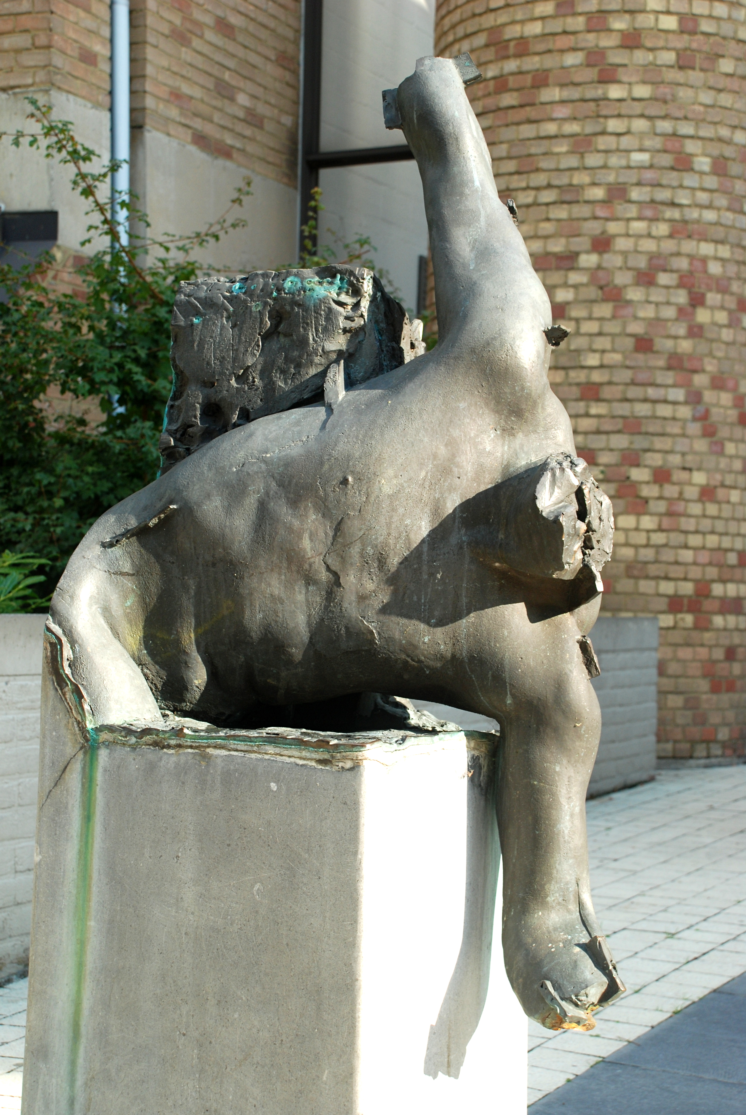 Belgique - Félix Roulin - Louvain-la-Neuve - Place Pierre de Coubertin